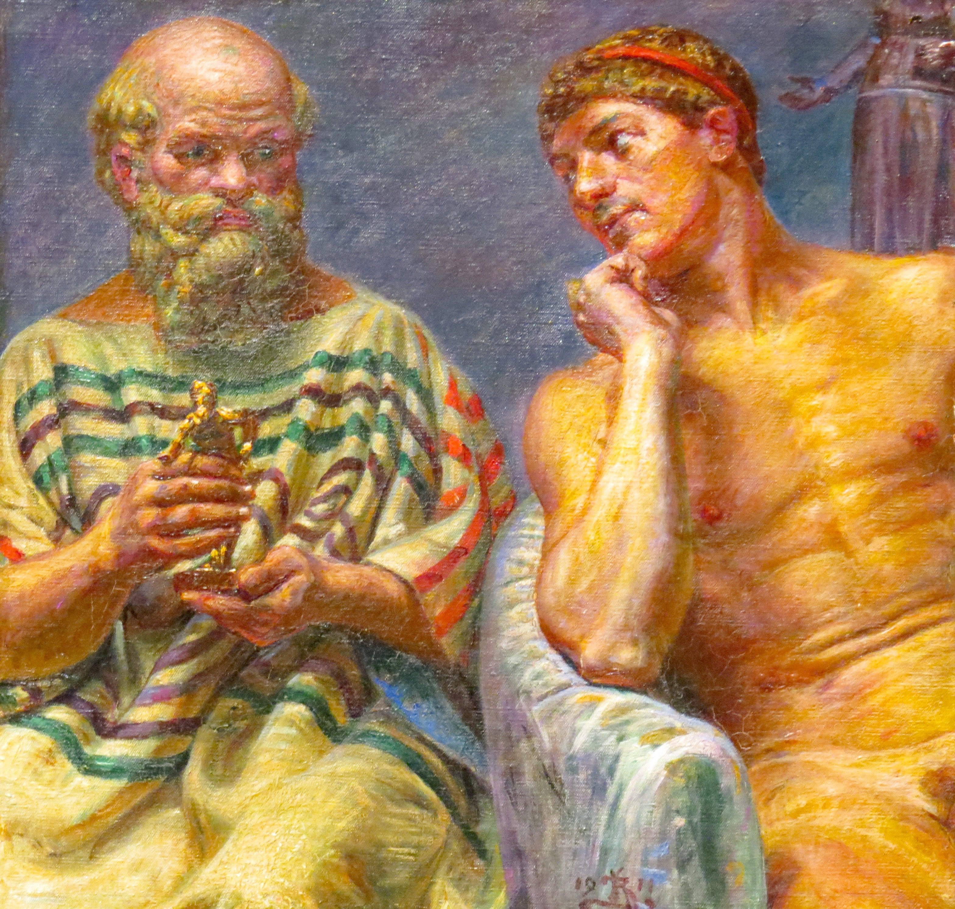 Udsnit af «Sokrates og Alkibiades» af Kristian Zahrtmann fra 1911, Statens Museum for Kunst, København